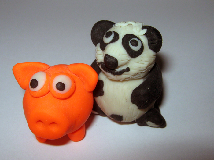 Фигурки из полимерной глины